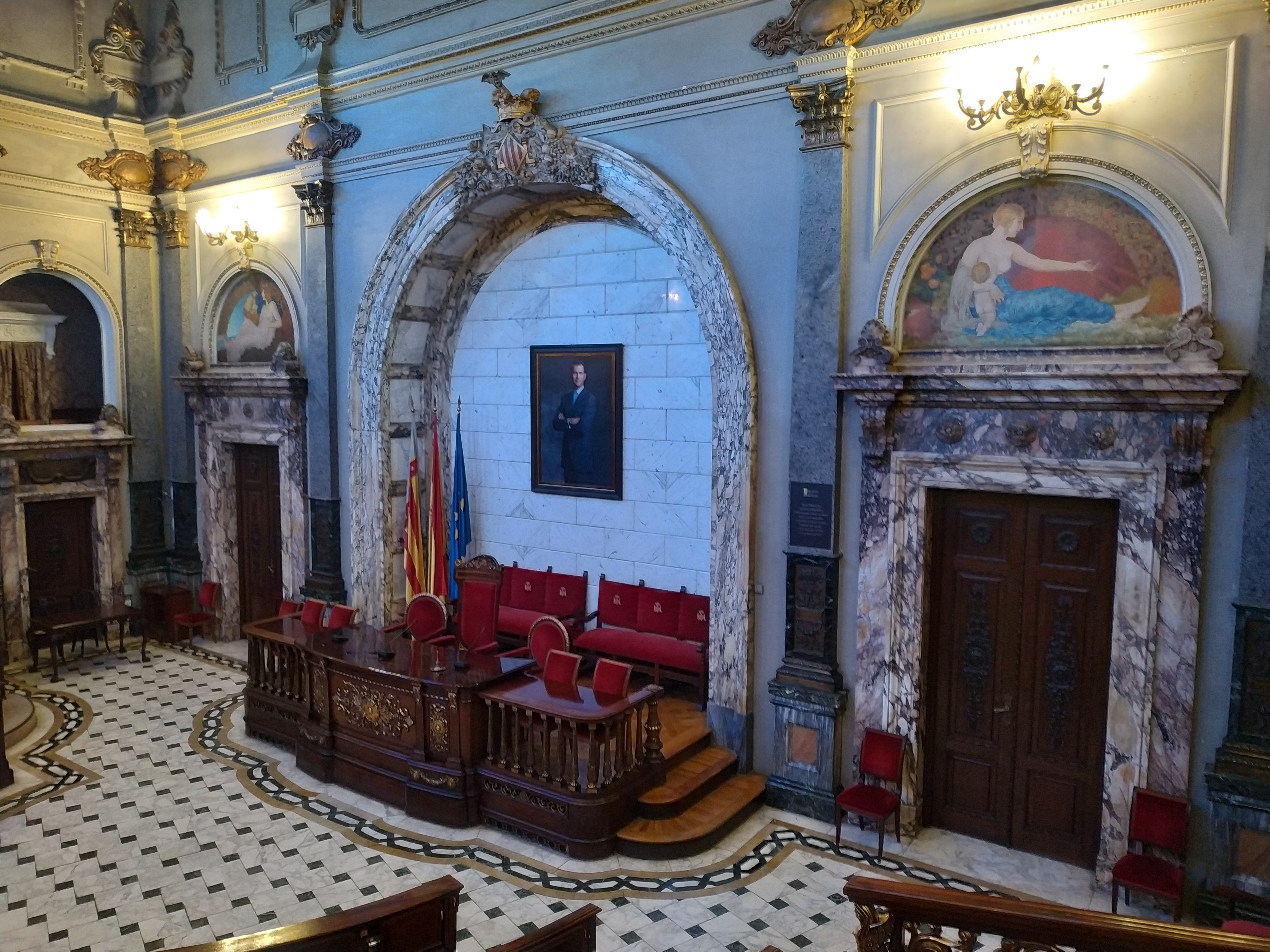 Hemiciclo del edificio del Ayuntamiento de Valencia.